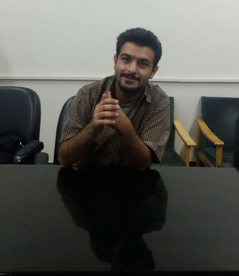 تۆرکجه: ائلیاد موسوی